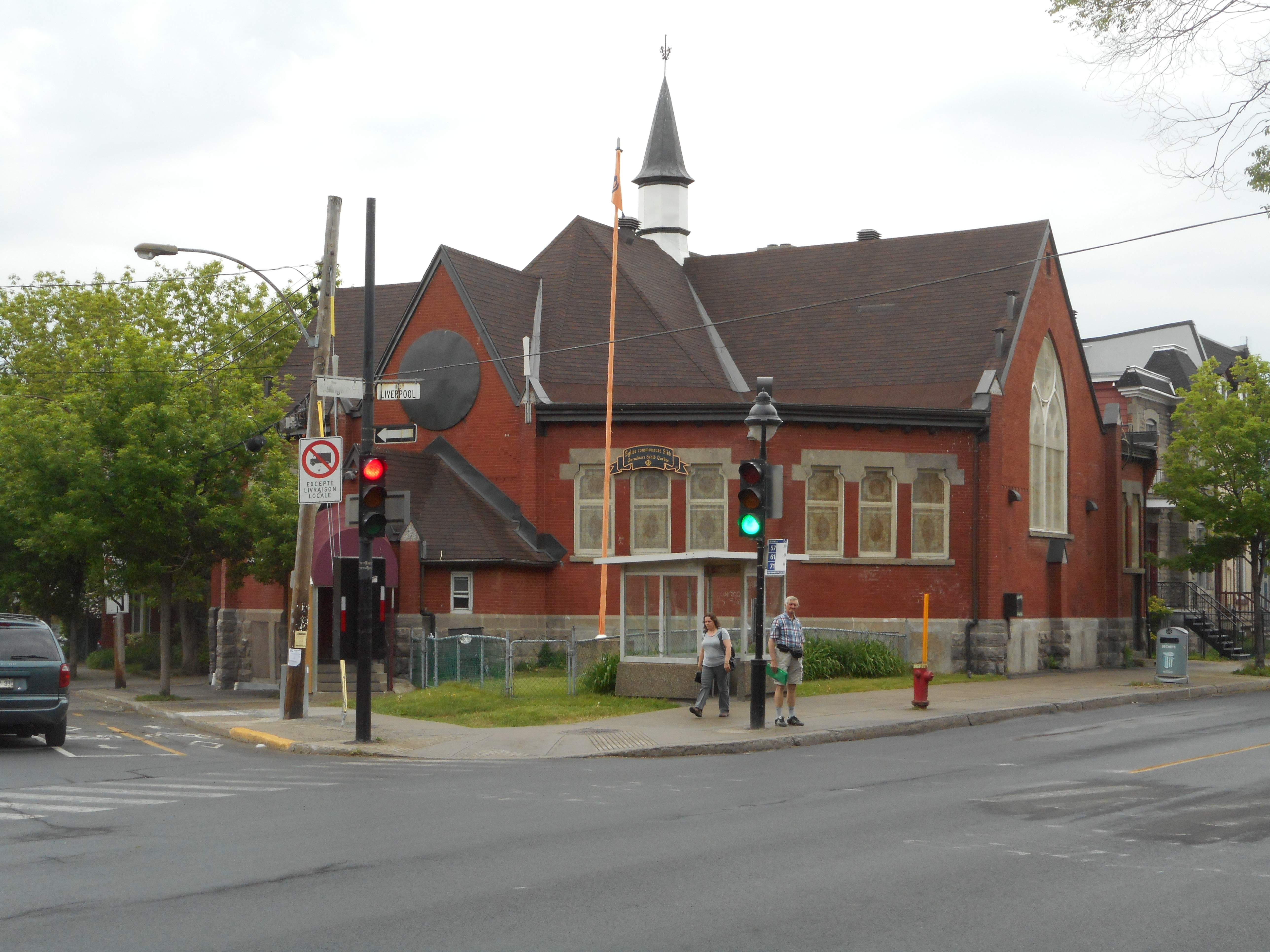 Temple Gurudwara Sahib Québec-Montréal (autres noms : Chapelle de la Bonne Nouvelle, Église Pointe Saint Charles Baptist), 2183, rue Wellington / rue Liverpool, Montréal « Cette église est la troisième que construisit la communauté baptiste de Pointe-Saint-Charles. La première fut ouverte en 1868 et la seconde, en 1891. La croissance rapide du nombre de membres obligea une fois de plus à changer de lieu de culte. Une troisième église est inaugurée en 1900. Son architecte, Arthur J. Cooke, l'a conçue en style néo-gothique avec son plan triangulaire symétrique à partir de l'entrée. La communauté sikh du Sud-Ouest de Montréal a acheté le bâtiment en 1985 et y célèbre les offices chaque dimanche. Un repas est servi au sous-sol du temple après la cérémonie religieuse. La population y est bienvenue. »